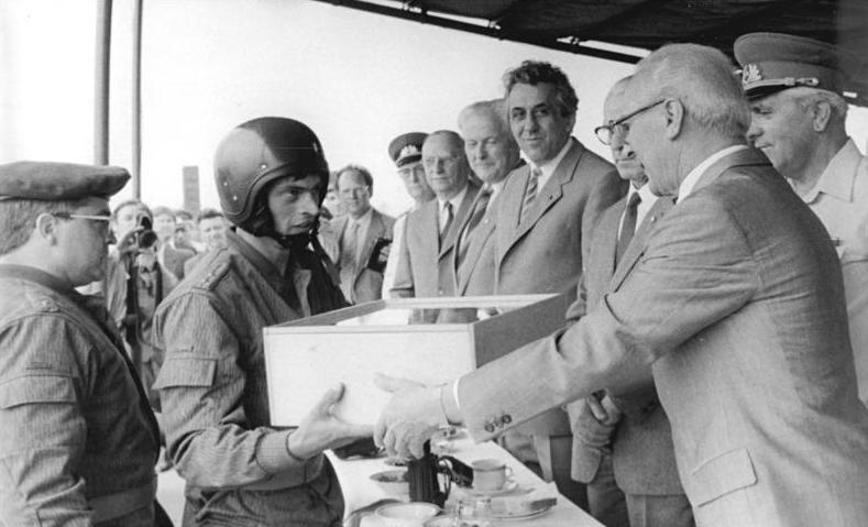 DDR, NVA-Truppenbesuch, Honecker ADN-ZB Mittelstädt 21.6.84 DDR: Truppenbesuch- Nachdem Fallschirmjäger aus dem Truppenteil "Willi Sänger" Elemente ihrer Gefechtsausbildung demonstriert hatten, landete Oberfähnrich Frank-Michael Juhl, abgesprungen aus einem Hubschrauber Mi-8 in 900 Meter Höhe, unmittelbar vor dem Generalsekretär des ZK der SED und Vorsitzenden des Staatsrates der DDR, Erich Honecker, Vorsitzender des Nationalen Verteidigungsrates der DDR und weiteren Ehrengästen. Er übergab ein Erinnerungsgeschenk. Der Fallschirmjäger ist mehrfacher Bester, langjähriger FDJ-Funktionär und Mitglied der Zentralen Parteileitung. [v.r.: Stechbarth (verdeckt), Honecker, Stoph (verdeckt), Krenz, Jarowinski, Hager] Abgebildete Personen: Honecker, Erich: Staatsratsvorsitzender, Generalsekretär des ZK der SED, DDR (GND 118553399) Krenz, Egon: Vorsitzender der FDJ, Generalsekretär des ZK der SED, Staatsratsvorsitzender, DDR